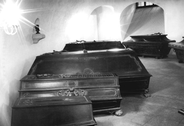 Dresden, Hofkirche, Bischofsgruft ADN-ZB Häßler 16.11.1989 Dresden: Jubiläum - In der Gruft der Dresdner Kathedrale befinden sich die Särge von Fürsten und Königen des sächsischen Hofes. Vor 250 Jahren wurde der Grundstein für die damalige Hof- und Pfarrkirche gelegt. August III., Kurfürst von Sachsen und König von Polen, beauftragte den italienischen Architekten Gaetano Chiaveri mit dem Entwurf und der Ausführung des Bauwerks. (siehe 1989-1116-008 bis 1989-1116-010)